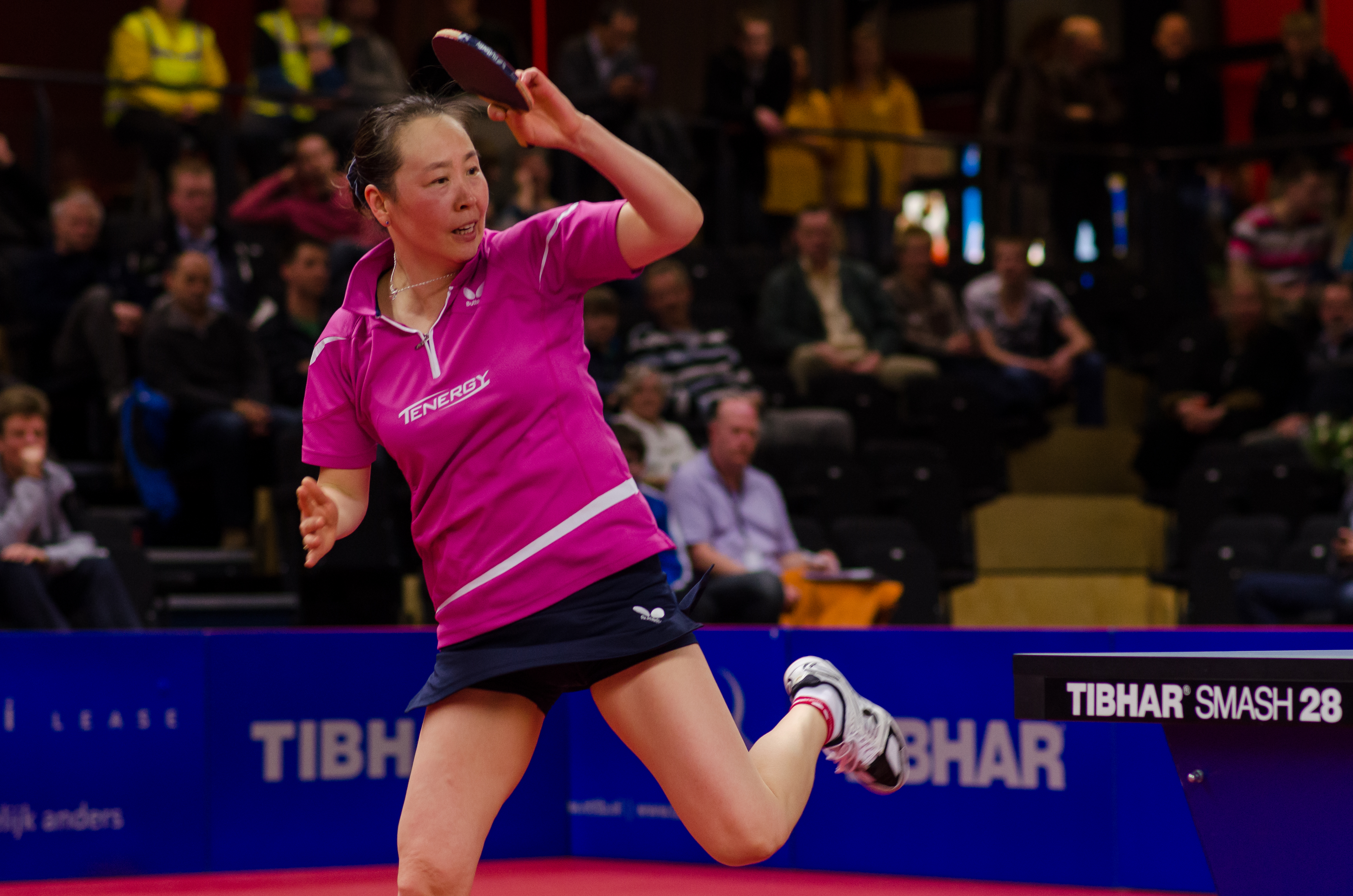 _DSC5445